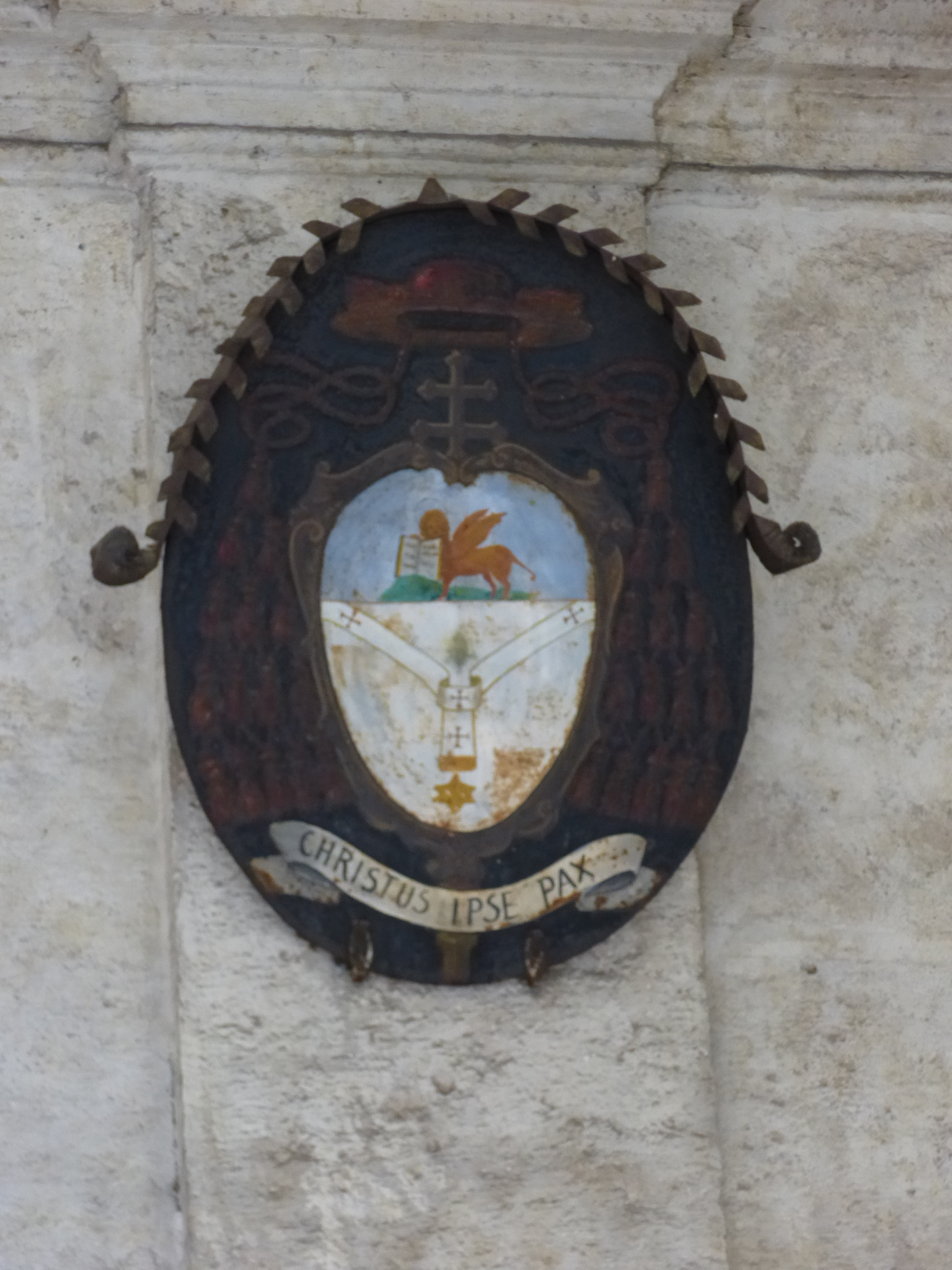 Roma, Basilica di San Marco Evangelista al Campidoglio, stemma del cardinale in titolo, Marco Cè.